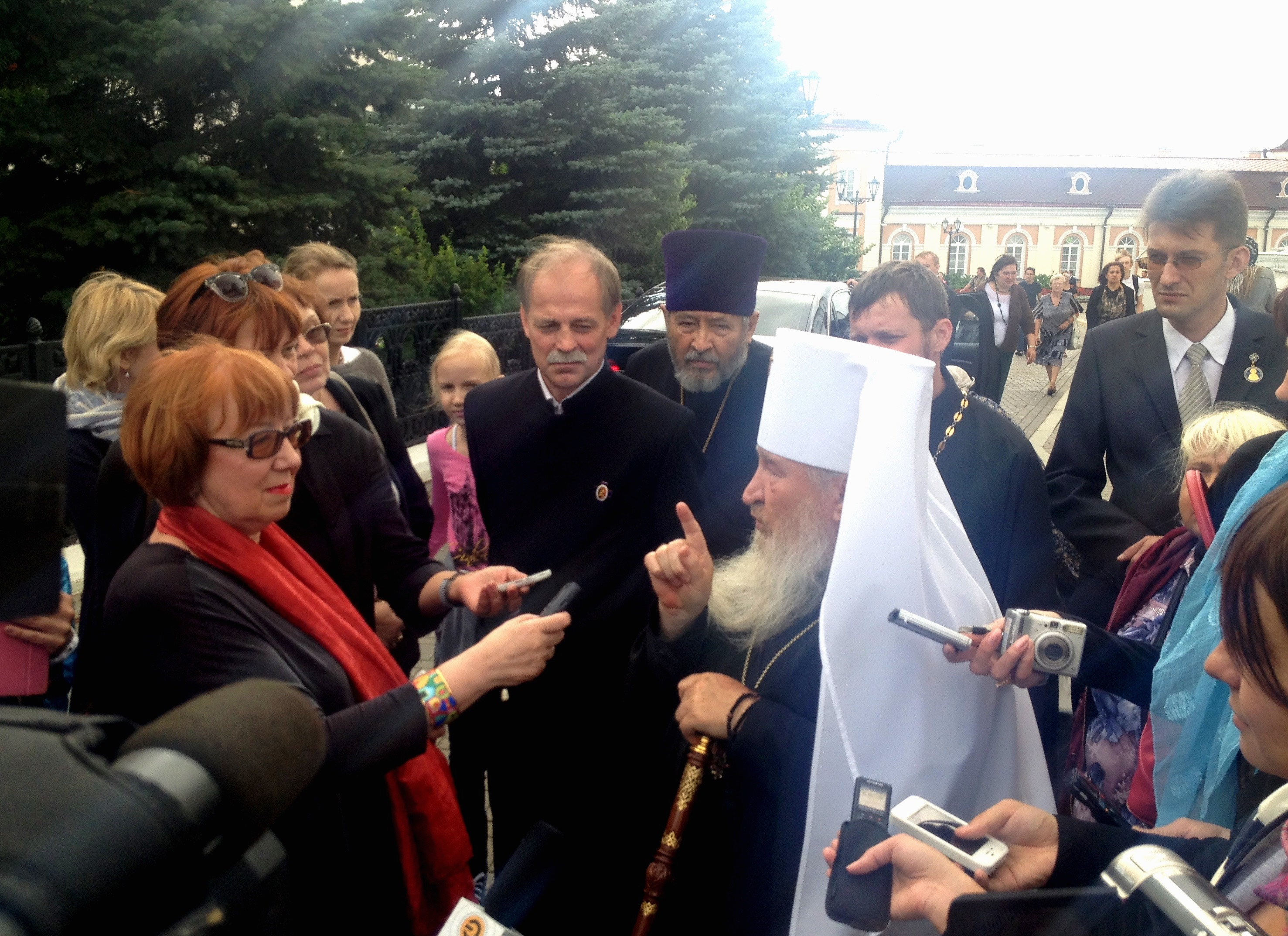 Митрополит Казанский и Татарстанский Феофан (И.А.Ашурков) в день своего приезда на служение в Казань (Казанский Кремль, 20 июля 2015 года).